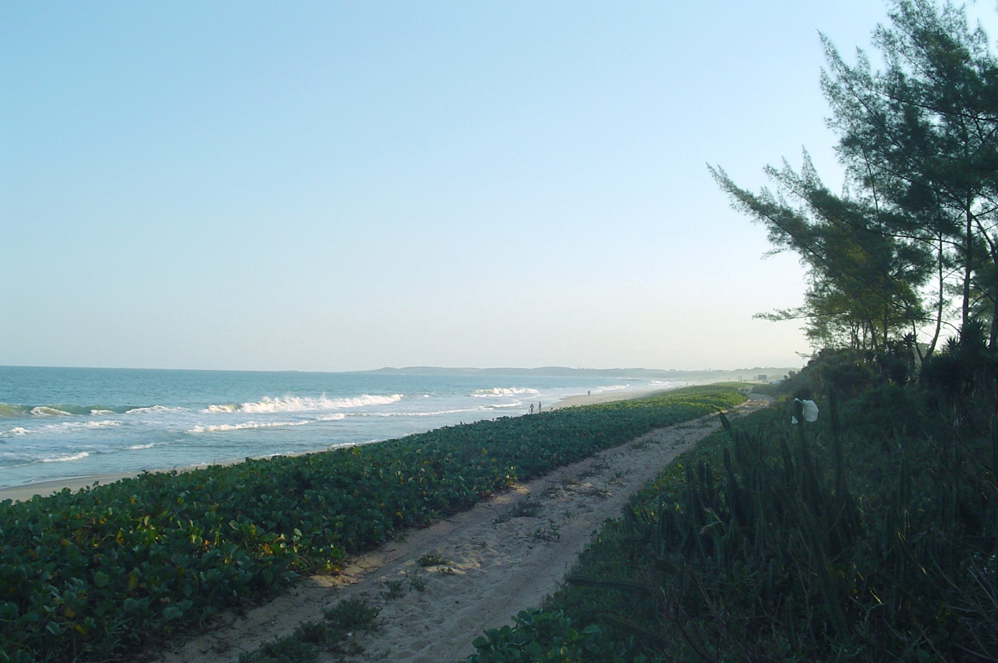 Photo:Praia do Pecado - Macaé - Rio de Janeiro - Brazil By Gladstone P. Moraes 2006-04